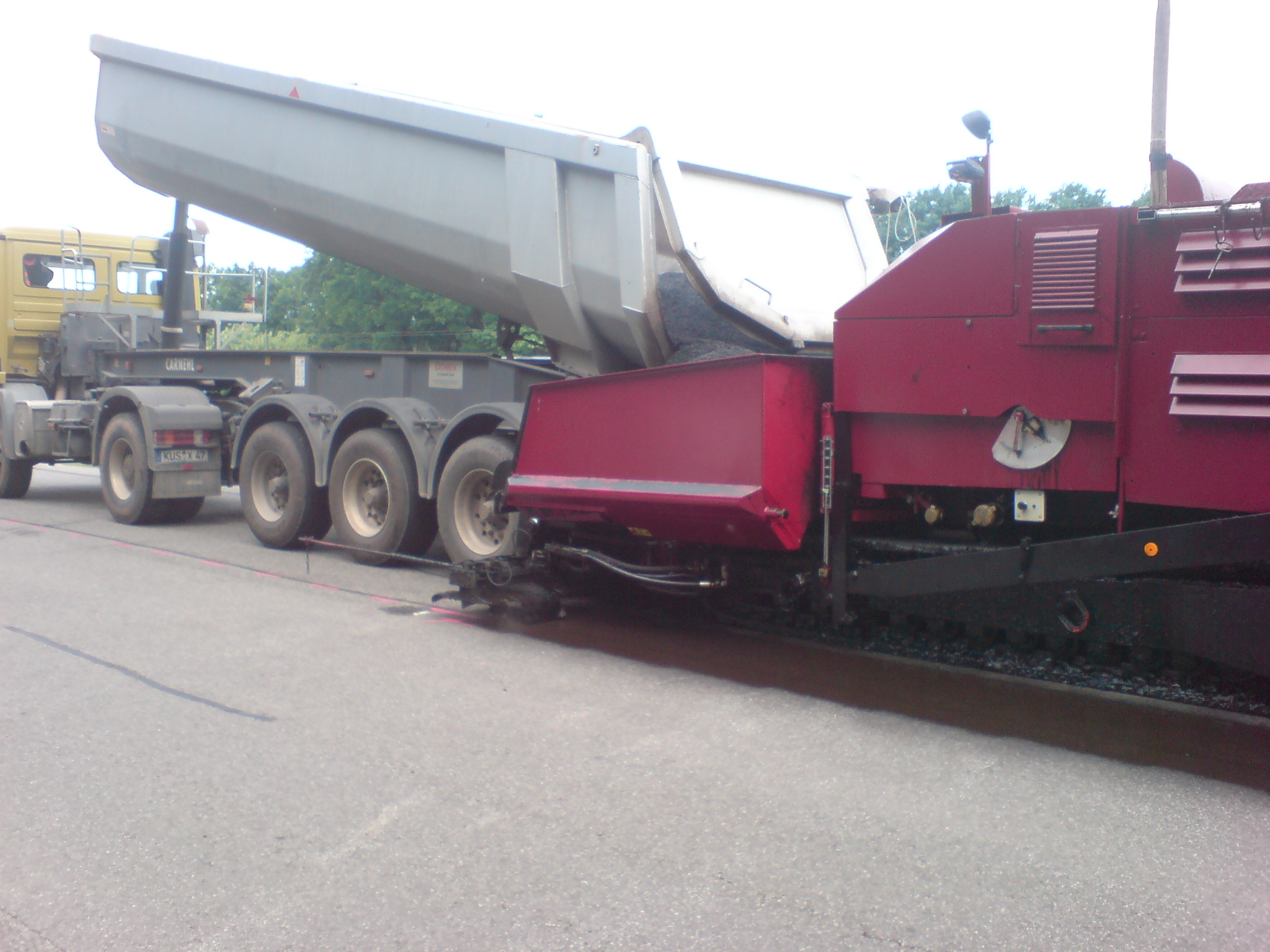 Sprühfertiger von Dynapac beim Dünnschichteinbau (2 cm) von Walzasphalt. Die Fahrspur der Kette wird kurz vor der Bohle mit Emulsion besprüht.